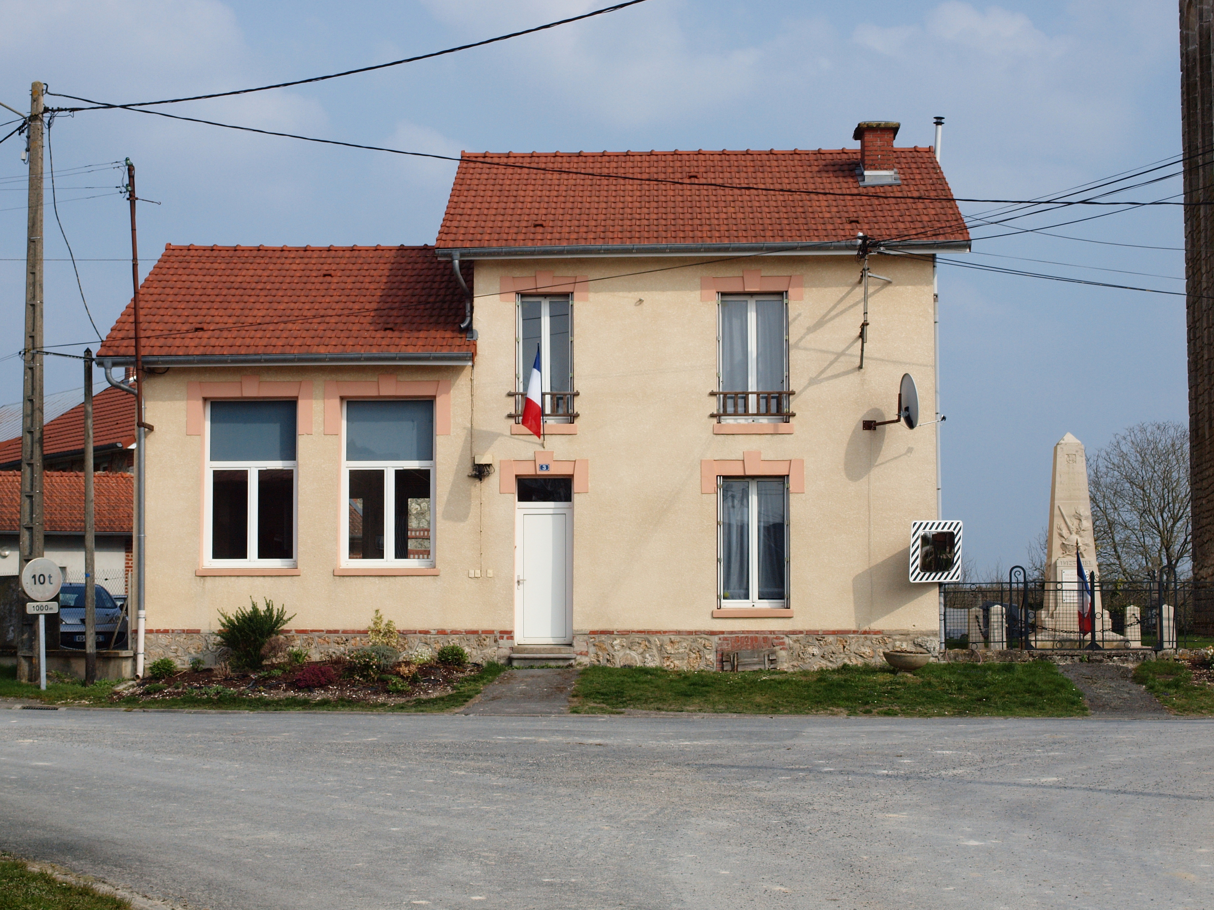 Gratreuil (Marne, France)